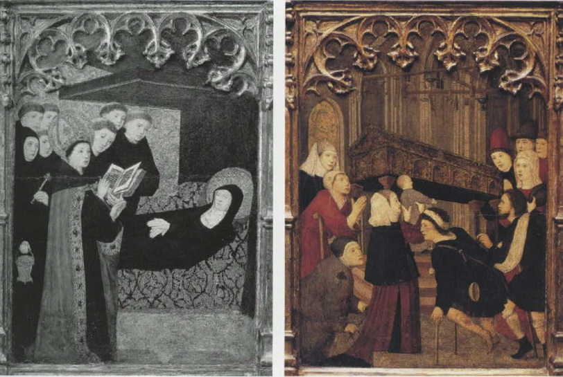 Trinitat, d'Antoine de Lonhy, al Museu d'Arte Antico de Torí